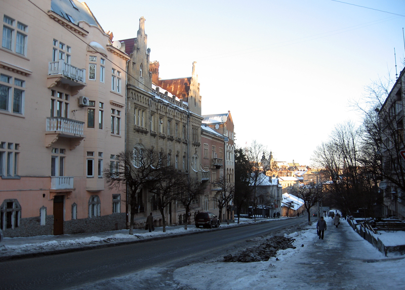 Панорама вулиці Героїв Майдану у Львові Panorama of Heroiv Maidanu street in Lviv